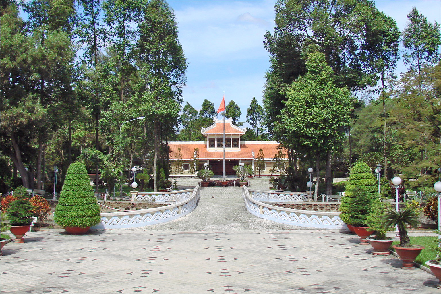 L'entrée du mémorial du Président Ton Duc Thang dans l'île du Tigre à Long Xuyen Le mémorial a été construit en 1997-1998 sur l'île du Tigre pour le 110ème anniversaire de sa naissance. L'île du Tigre (Tiger Island) est située à Hoa Hung, une bourgade de la ville de Long Xuyen dans la province d'An Giang, au Vietnam. L'île est constituée de limons déposés par le fleuve Bassac (en vietnamien Hậu Giang, ou deuxième fleuve) qui est un bras (ou défluent à l'est) du Mékong. Autrefois sauvage et repère de tigres et de panthères d'où son nom, l'île a été habitée et cultivée en raison de la fertilité de ses sols. Président de la république socialiste du Vietnam, pionnier et doyen du mouvement ouvrier vietnamien, Ton Duc Thang (1888-1980) est né dans une famille paysanne, habitant sur l'île du Tigre, dans ce qui était alors la Cochinchine française. Sa famille appartenait à la secte bouddhiste Hoa Hao. La secte bouddhiste Hoa Hao ( Phat Giao Hoa Hao ) est apparue en 1939 dans cette région. Au cours des années, elle est devenue une véritable force politique et militaire contre la colonisation française puis une partie des militants a rejoint le Viet-Cong. Ton Duc Thang a été un important dirigeant communiste mais il est beaucoup moins connu qu'Hô Chi Minh. article de Wikipedia